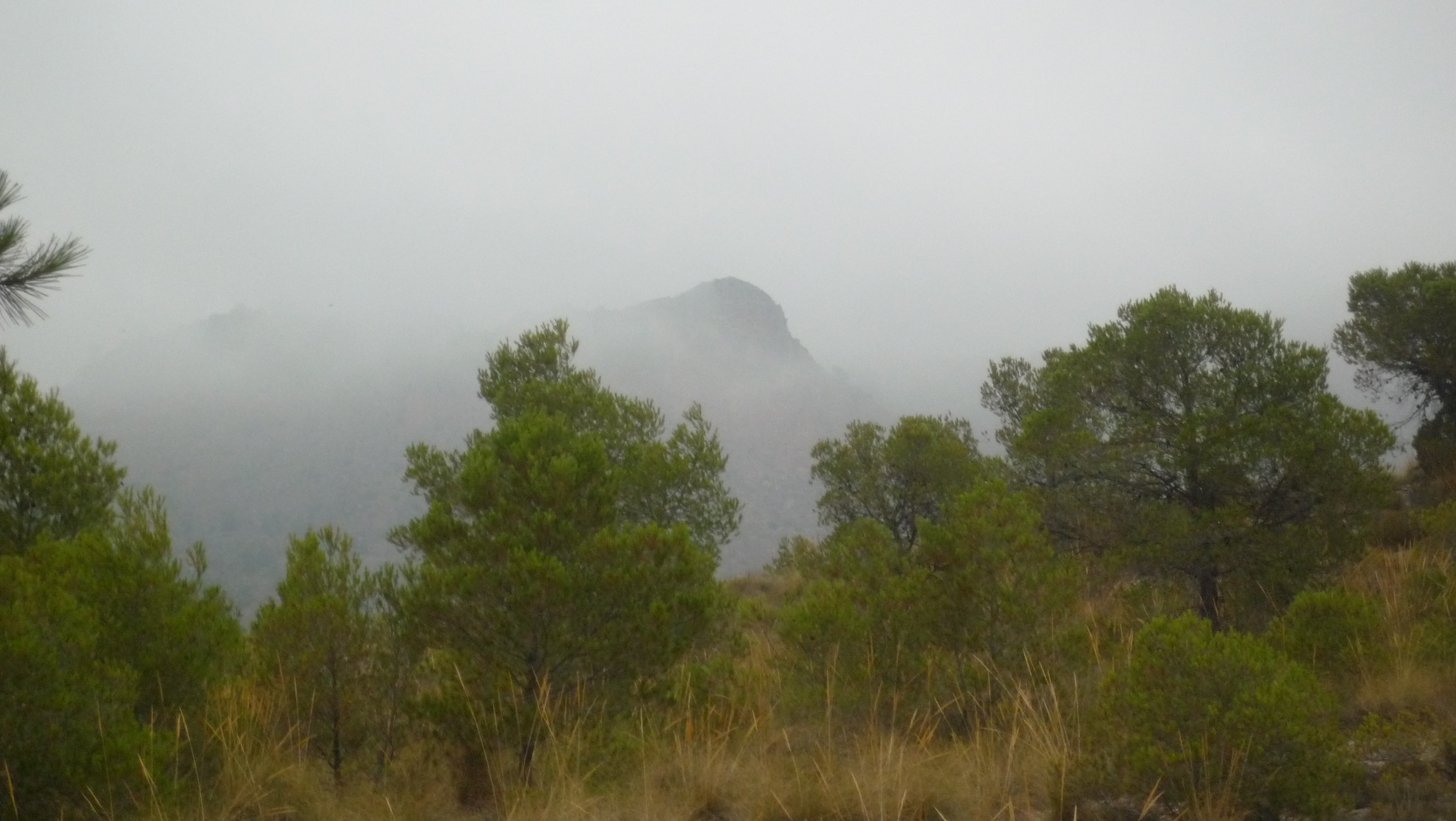 Pitón volcánico de Cancarix, vista desde el inferior de la montaña.